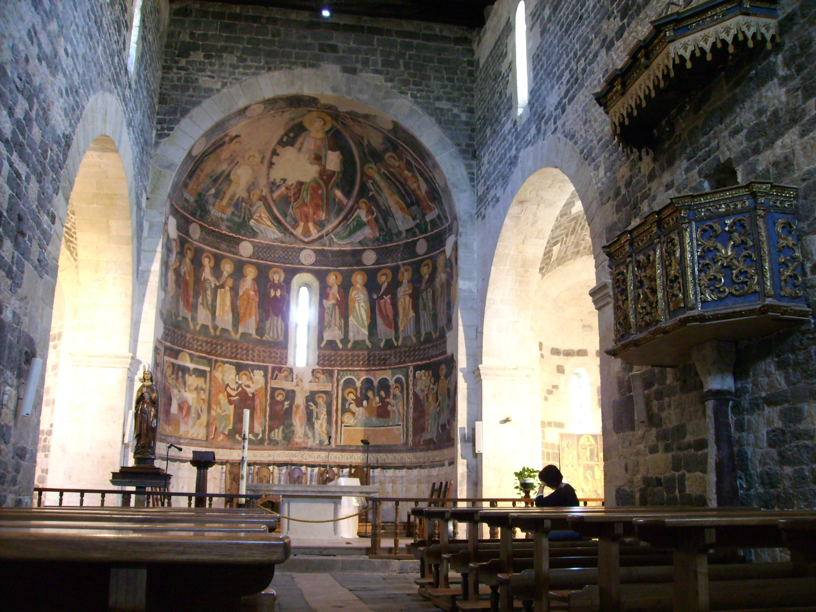 Abtei Santissima Trinita di Saccargia, Logudoro, Sardinien